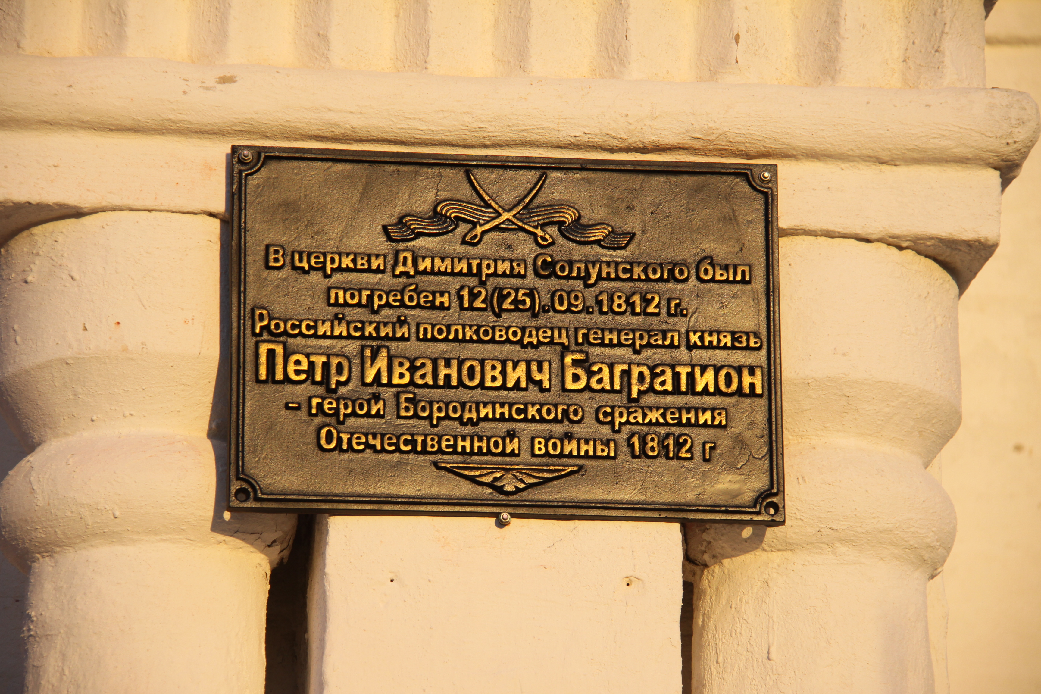 Табличка на Храме Д.Солунского в пос. Сима Владимирской области о первом захоронении П.Багратиона